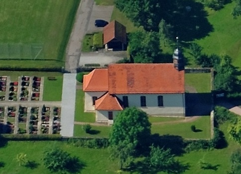 Bad Mergentheim-Rot, kath. Kirche St. Peter und Paul